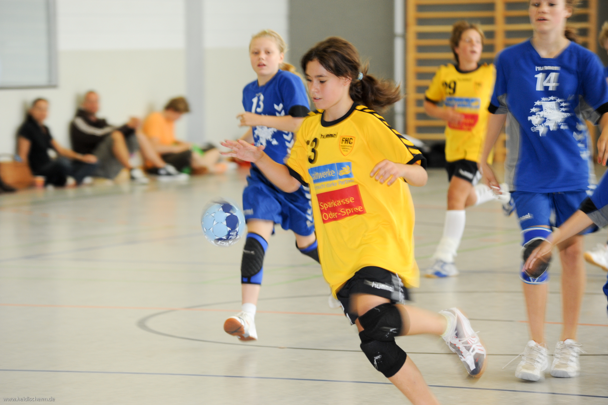 Nuon Cup 2008, Handball Turnier, Berlin-Reinickendorf